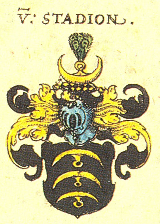 Ritterschaft und Adel in Schwaben von Stadion